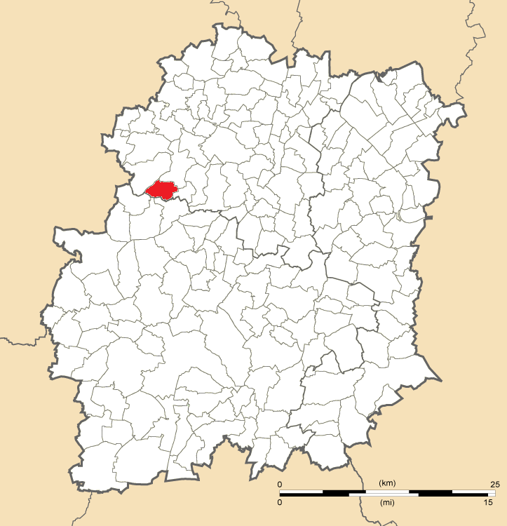 Carte de position de Vaugrigneuse en Essonne (91)